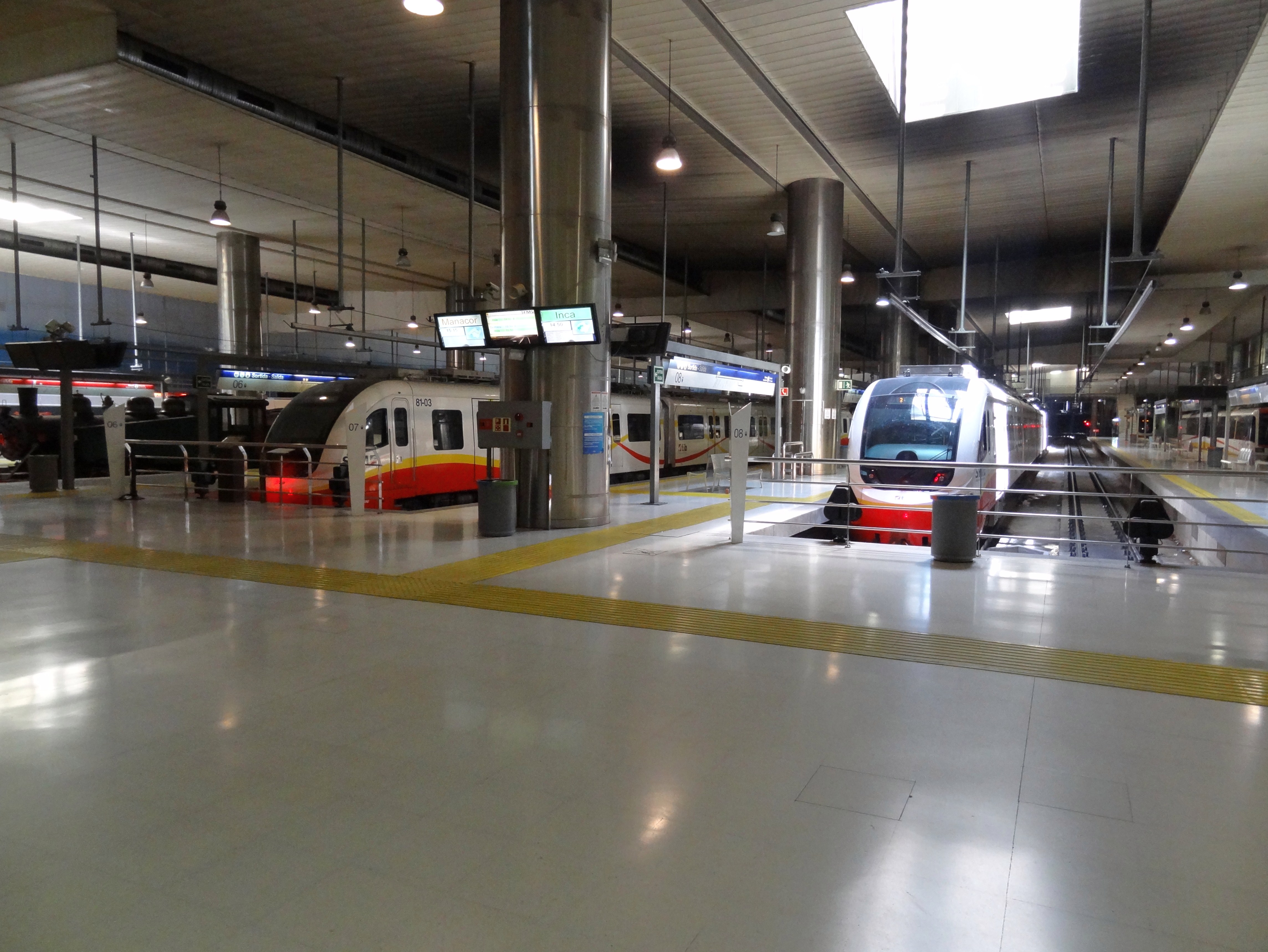 Estació Intermodal an der Plaça de Espanya in Palma, Mallorca, Spanien